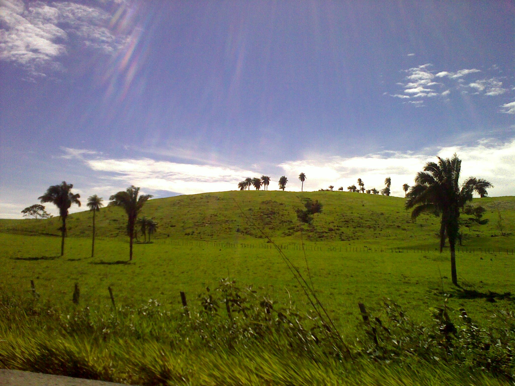 Barinas